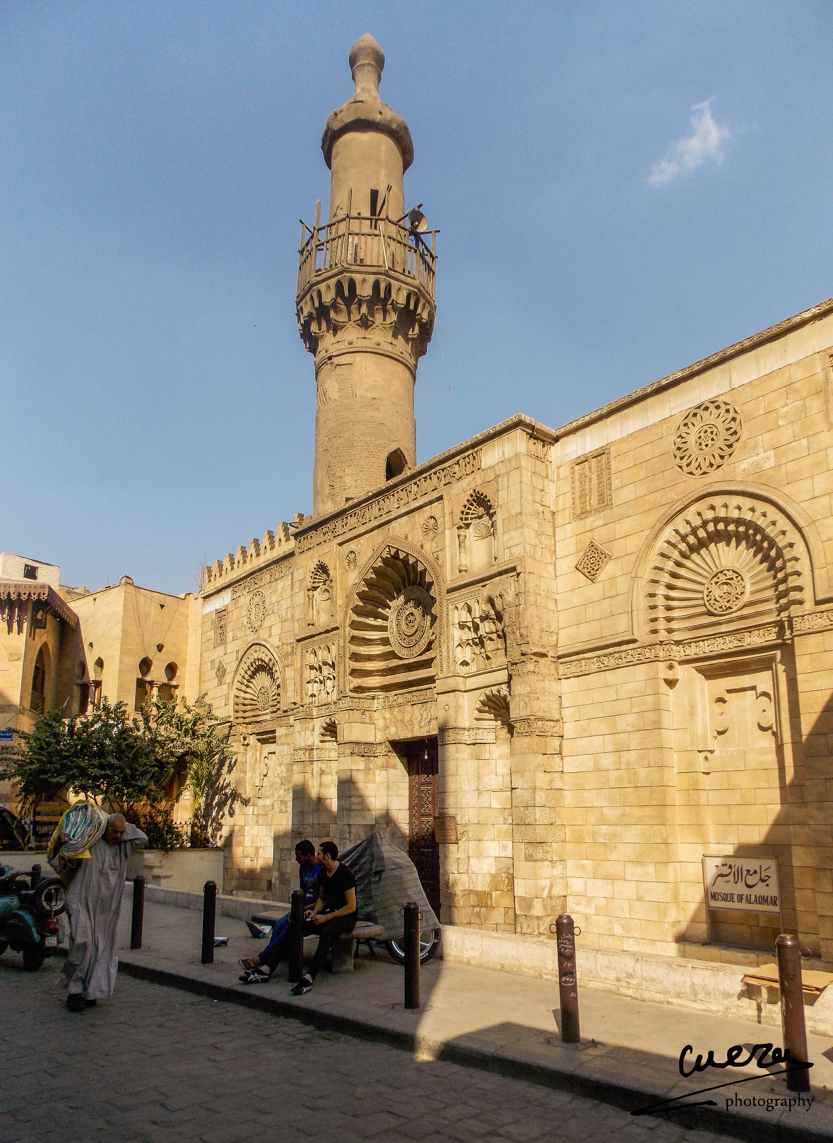 مسجد الأقمر بشارع المعز